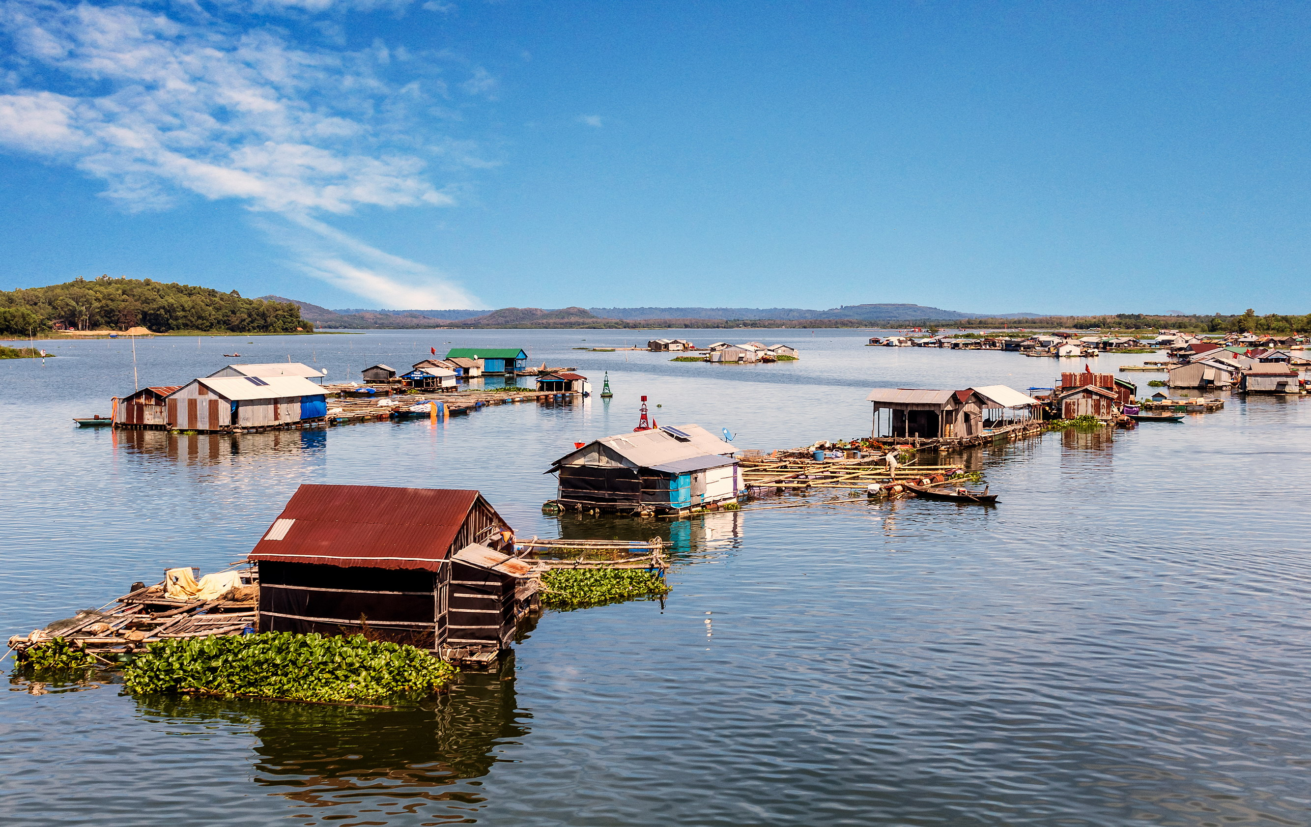 Những bè nuôi cá trên sông La Ngà ở địa phận tỉnh Đồng Nai, Việt Nam.